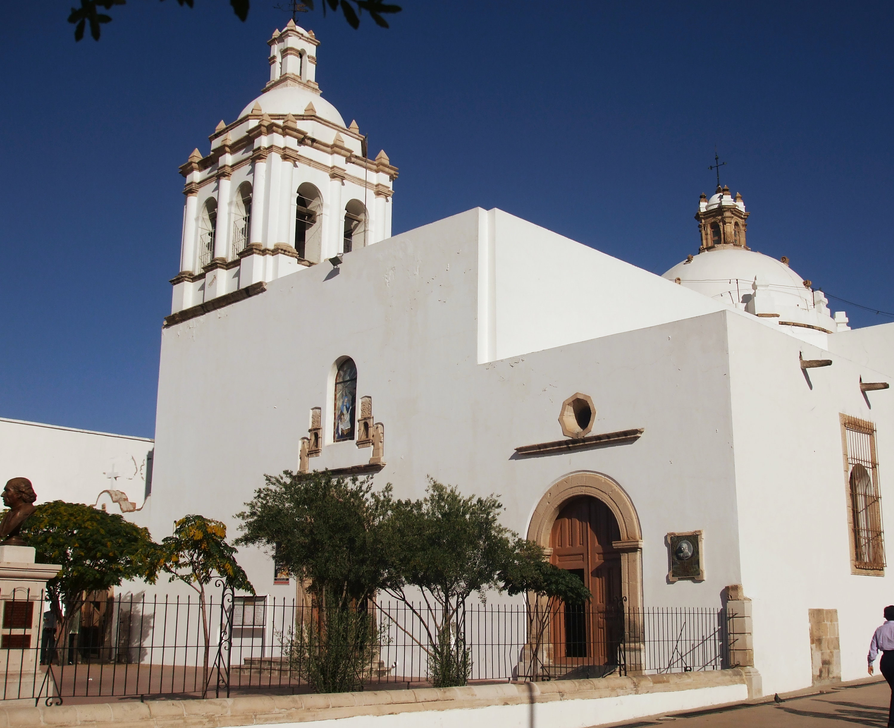 Templo de San Francisco, Chihuahua, Chih.